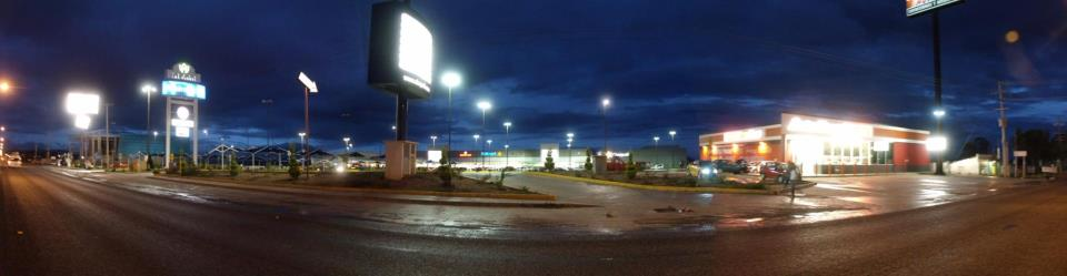 plaza las flores nocturna